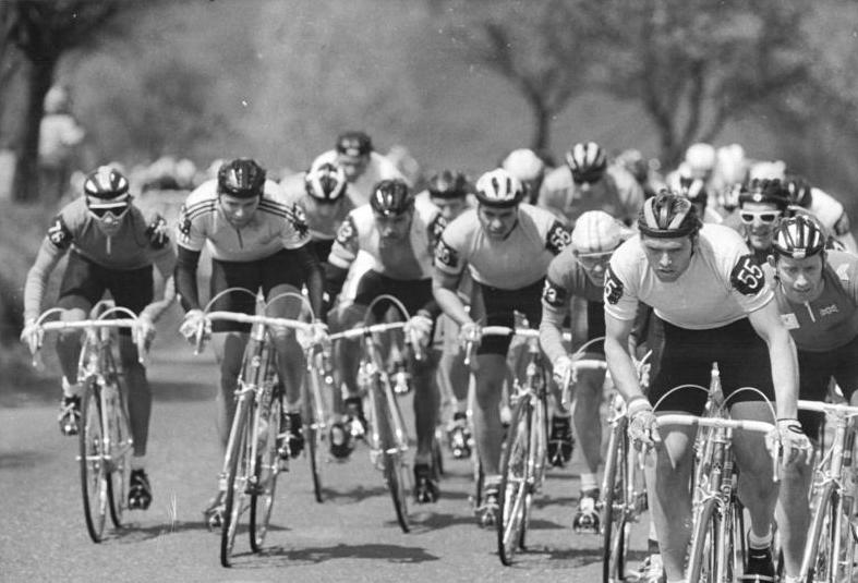 Friedensfahrt, Fahrerfeld ADN-ZB Kasper 14.5.87 ma-CSSR: 40. Internationale Friedensfahrt-6. Etappe von Most nach Prag über 152 km-Kurz hinter Zatec (km 19) führ der spätere Etappen-Zweite und neue Träger des GElben Trikots, Olaf Ludwig, das Feld bei einem kleinen Anstieg an. In der Mitte ist Uwe Raab (beide DDR), der Drittplazierte in Prag, zu erkennen.